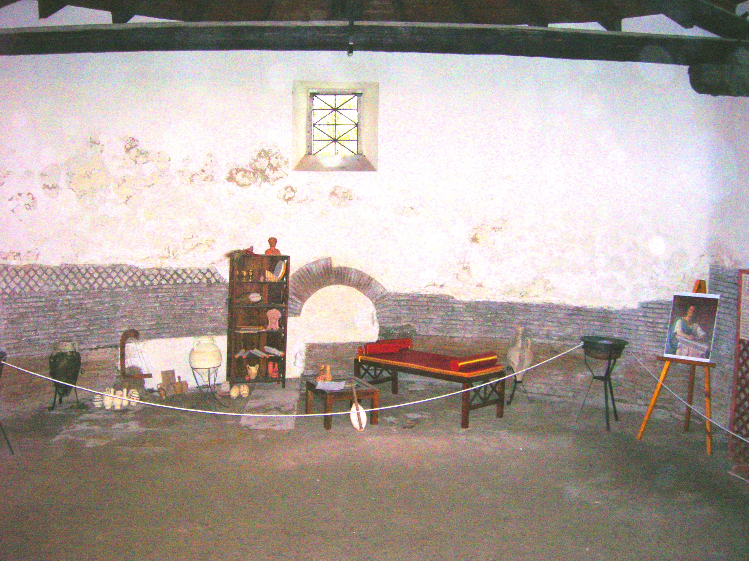 Esempio di suppellettili e d'arredo in uso in una domus, proposta nalla cosiddetta casa di Orazio (Quintus Horatius Flaccus), Venosa (PZ)